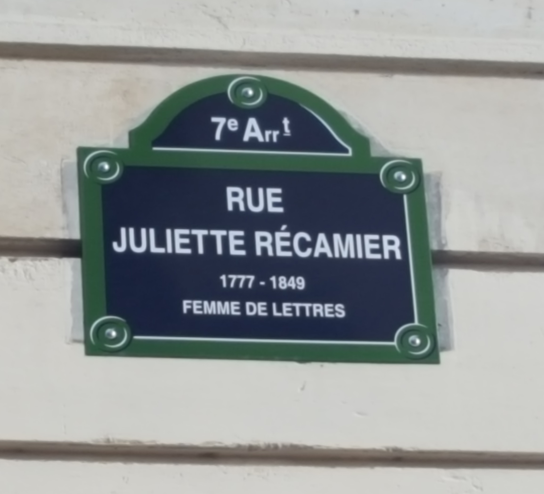 Plaque de la rue Juliette Récamier, Paris, France